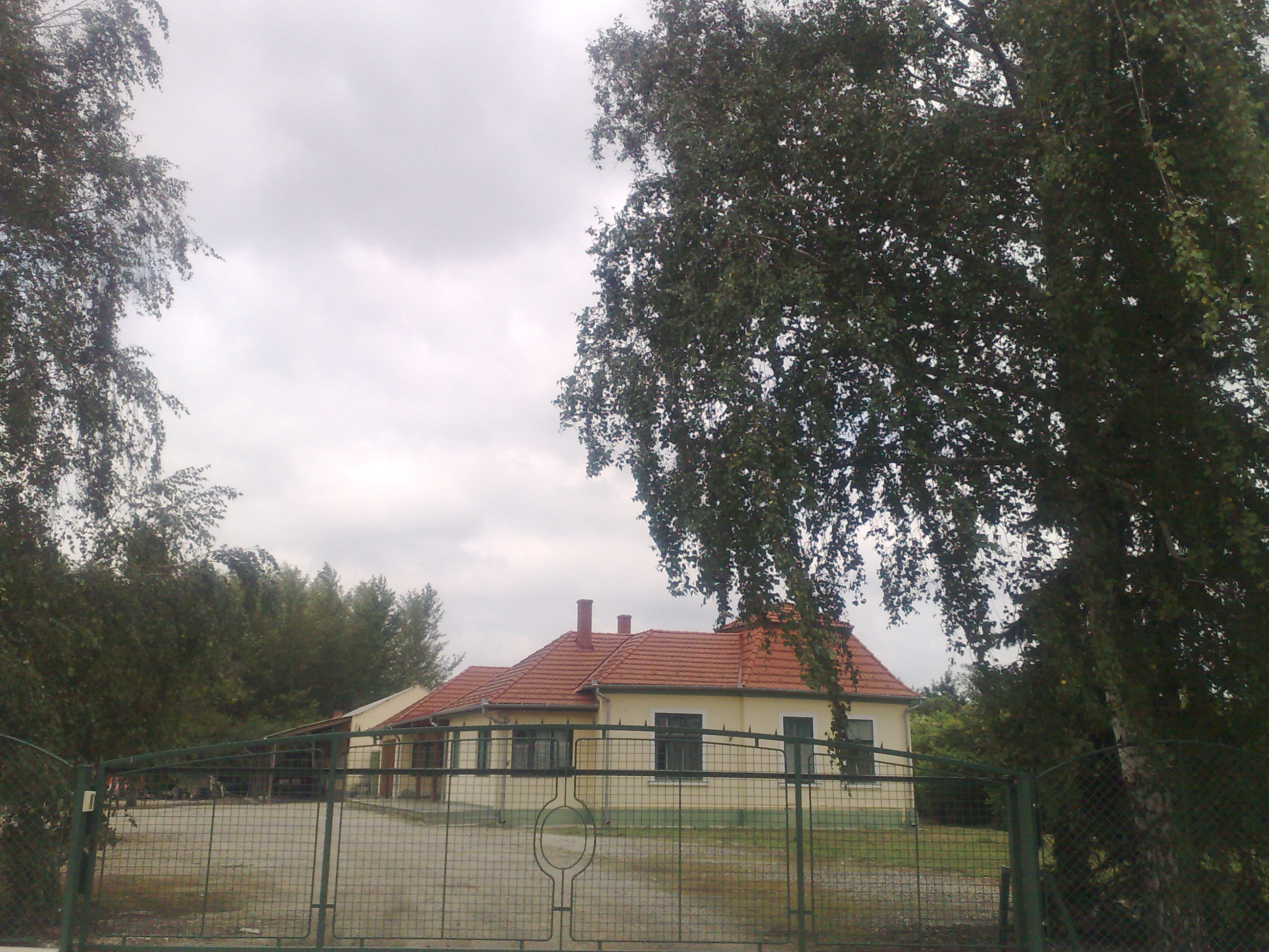 Vadászház Szany községben